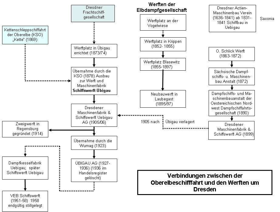 Verbindungen zwischen der Oberelbeschifffahrt und den Werften um Dresden